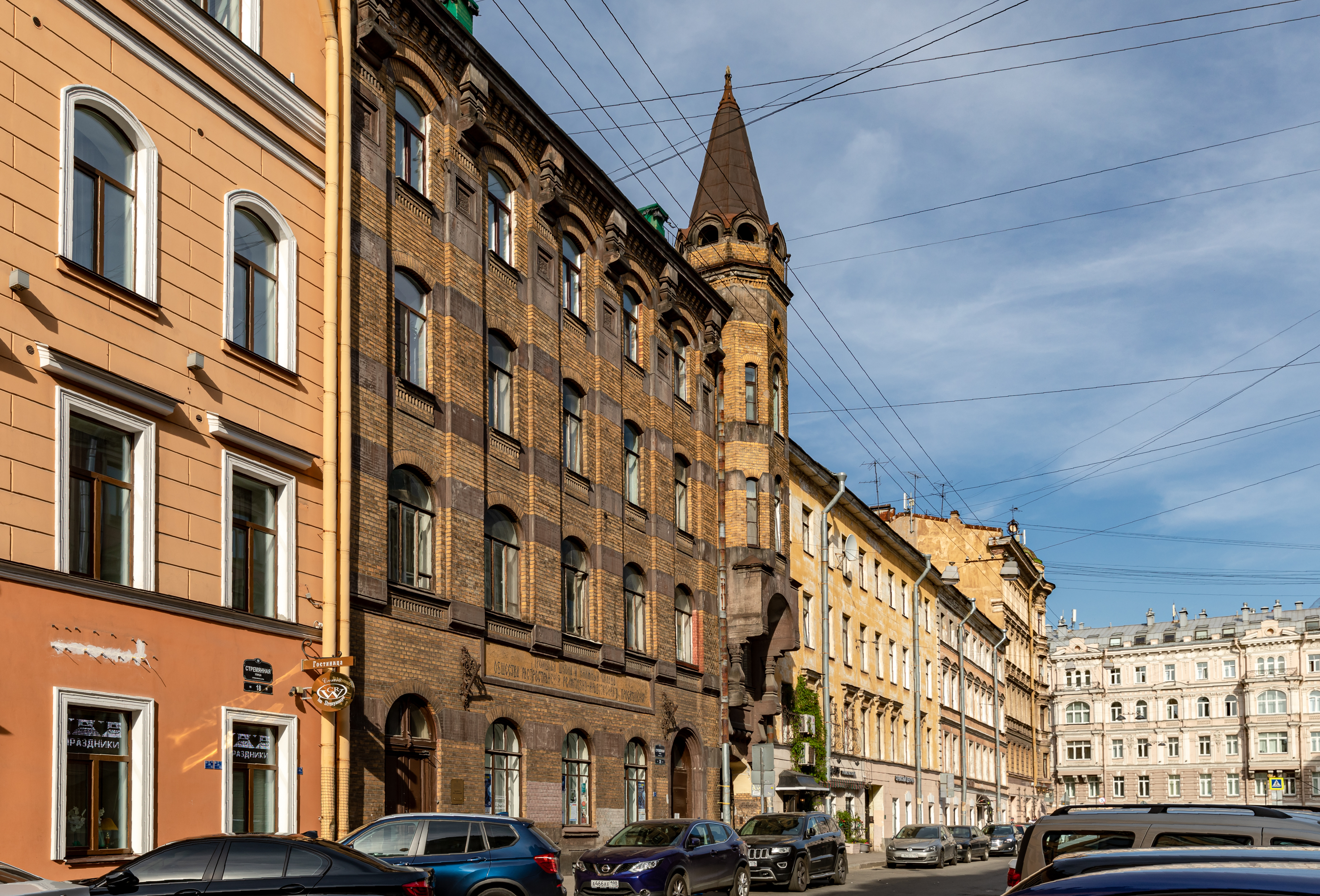 Stremyannaya ulitsa